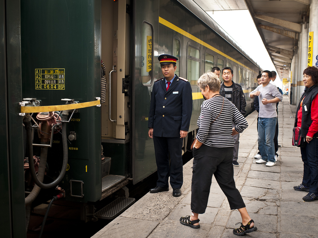 Between Beijing-Lhasa